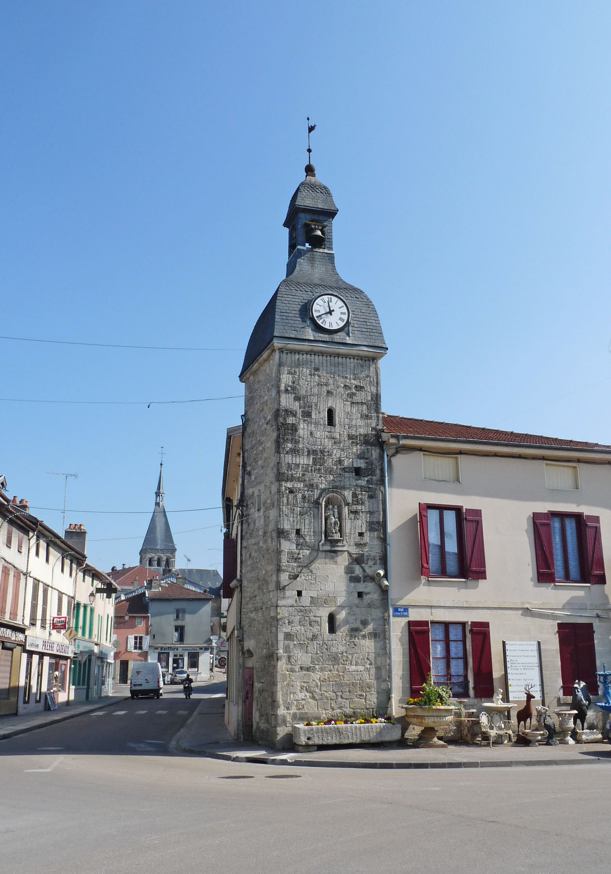 Tour du Dôme à Wassy (Haute-Marne). Classée MH en 1933.